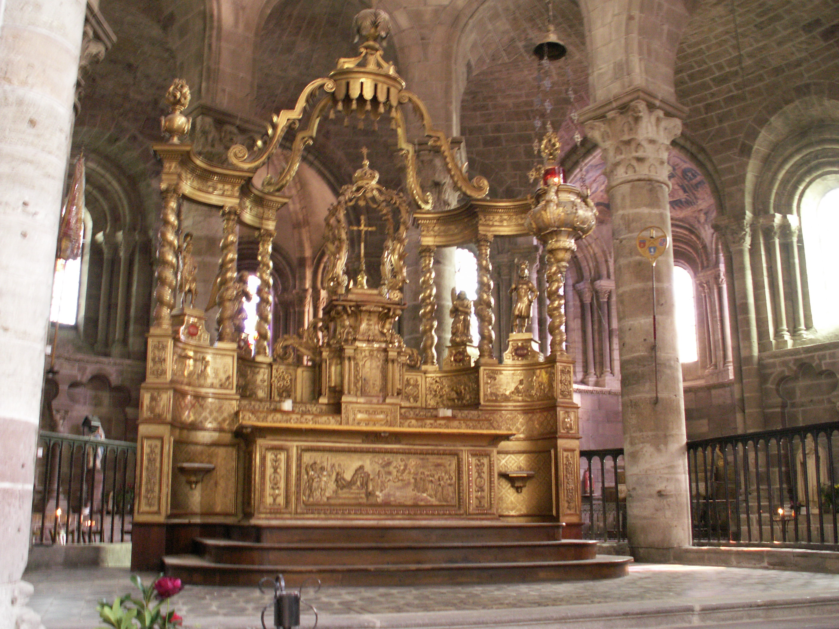 Autel majeur dans sa forme tridentine et tabernacle de l'église de Saint-Julien de Brioude